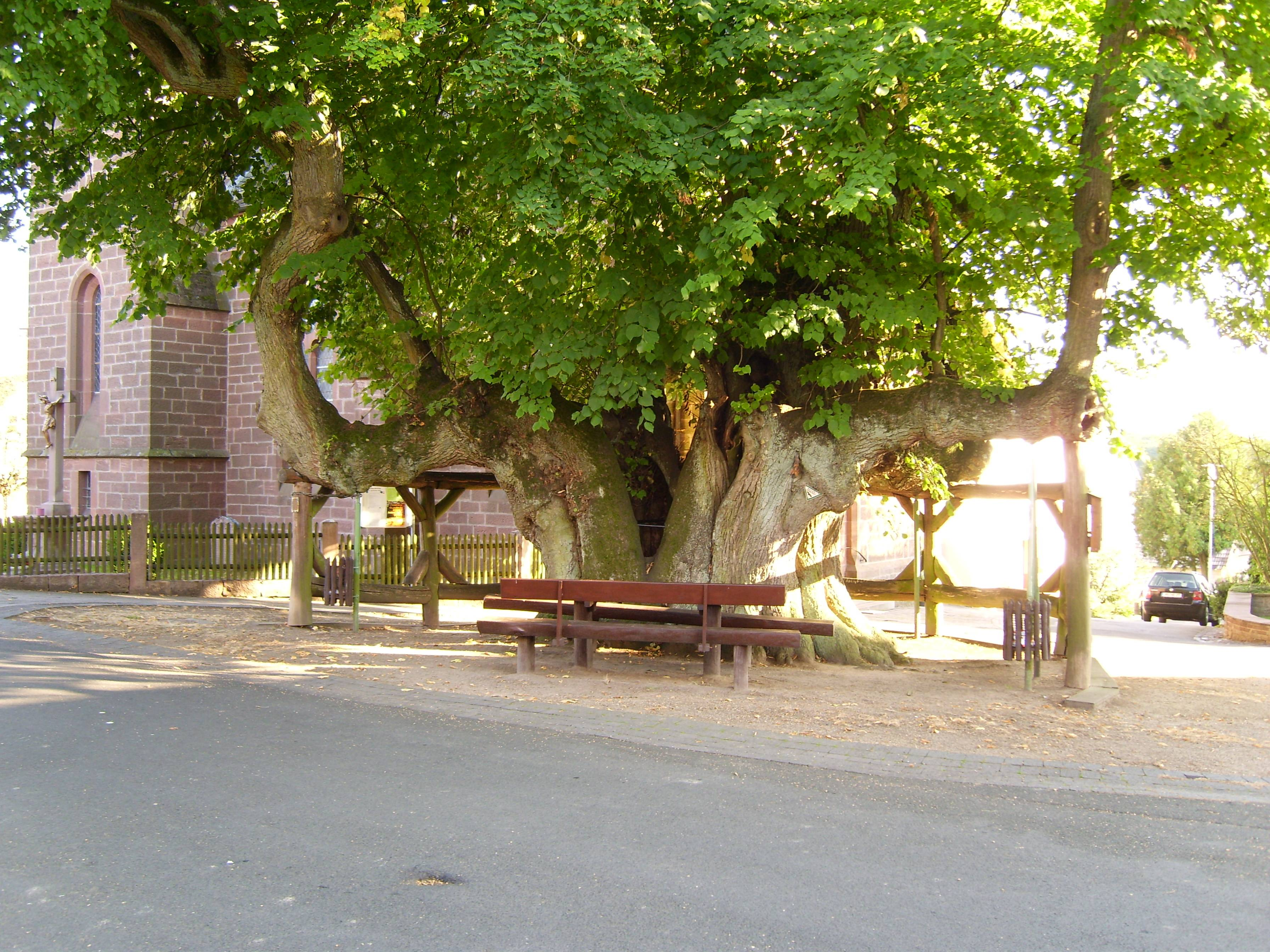 Stamm der angeblich 1000-jährigen, mindestens aber 700-jährigen Sommerlinde in Himmelsberg